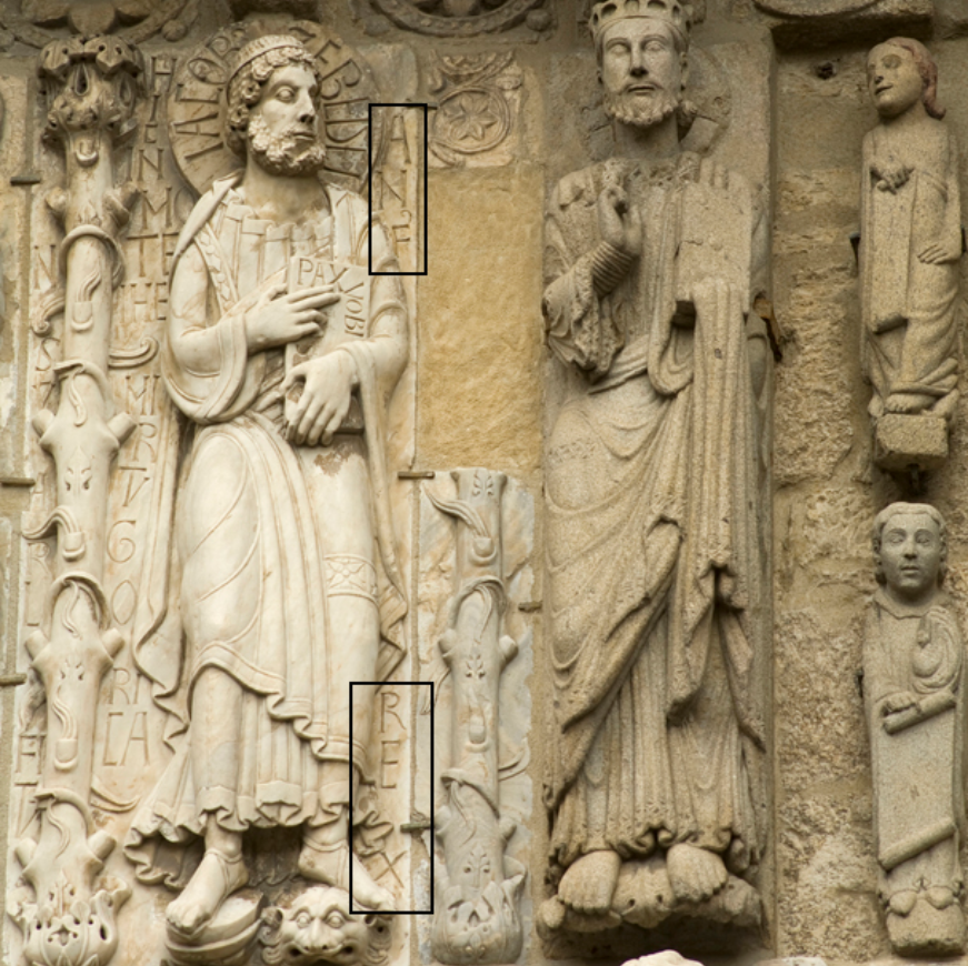 O apóstolo Santiago na fachada das pratarías da Catedral de Compostela. Apreciase á súa esquerda a inscrición "ANFUS REX", realizada para sinalar a coroación no 1111 de Afonso VII, fillo de Raimundo de Borgoña, como rei de Galiza